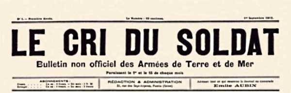 Manchette du journal Le Cri du Soldat fondé par Émile Aubin le 1er septembre 1912.